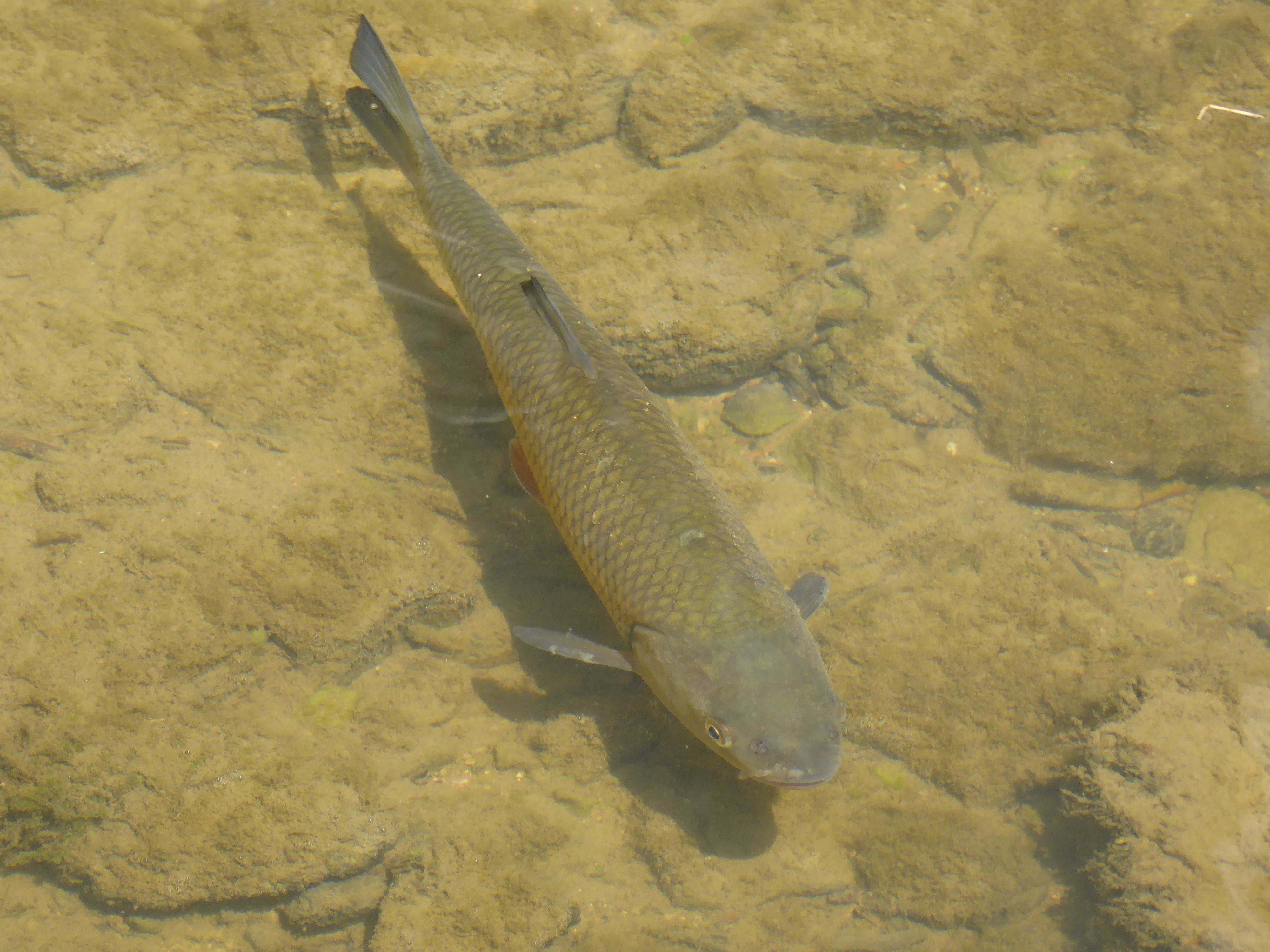 Poisson dans l'Aroffe supérieure à Gémonville, en Meurthe-et-Moselle (France).